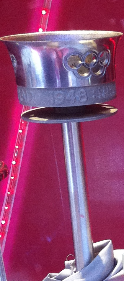 1948年夏季奧運火炬